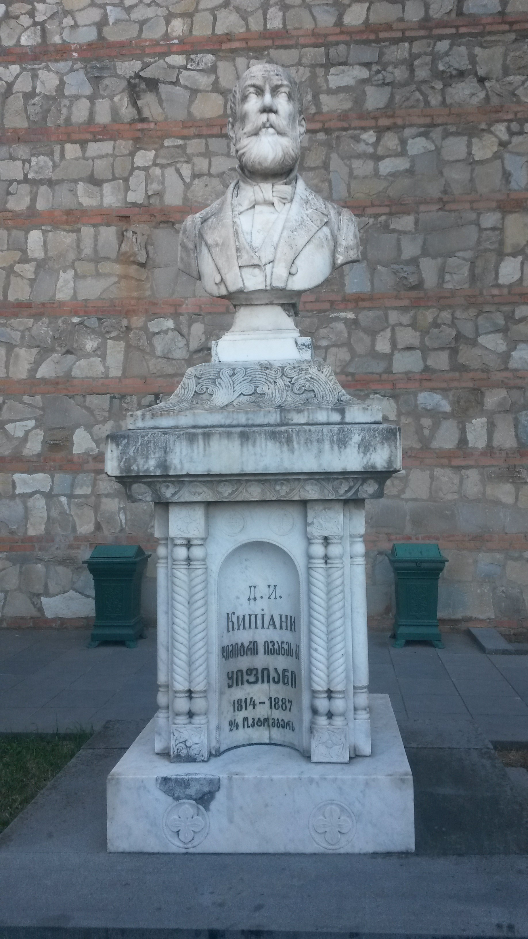 მთაწმინდის პანთეონი